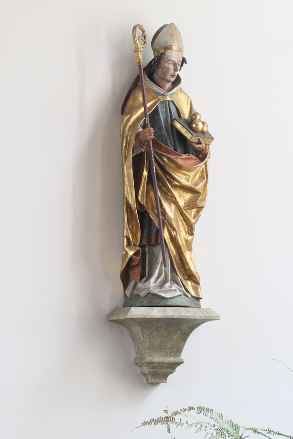 Alte katholische Pfarrkirche, jetzt Filialkirche St. Nikolaus in Freimann im Stadtbezirk Schwabing-Freimann in München (Bayern/Deutschland)